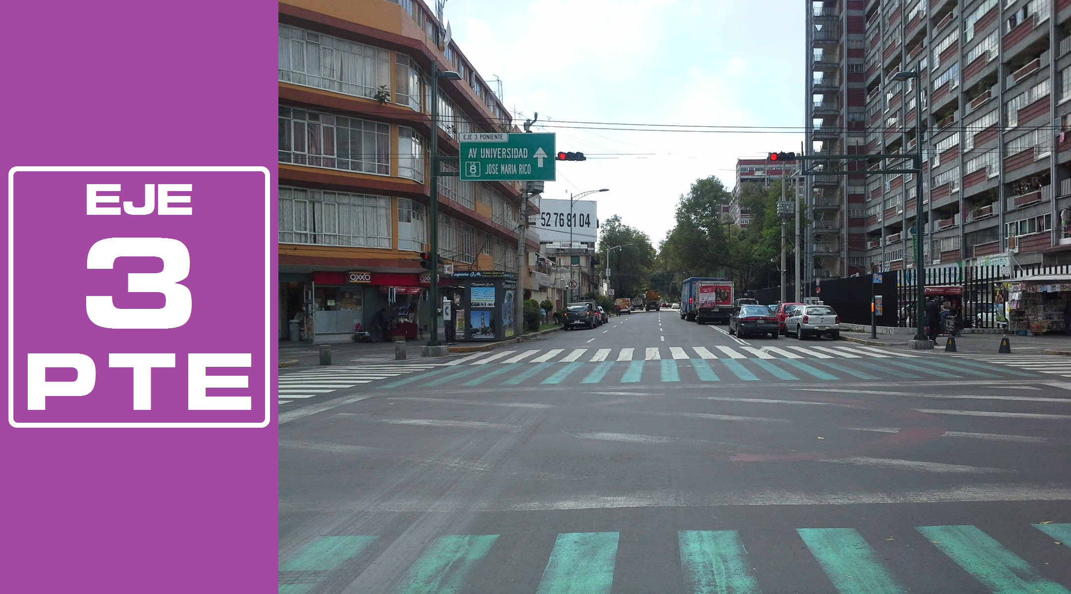 Rediseñado original de la señalética de los Ejes viales de la Ciudad de México por José García (Wiki ID: narumiyama)